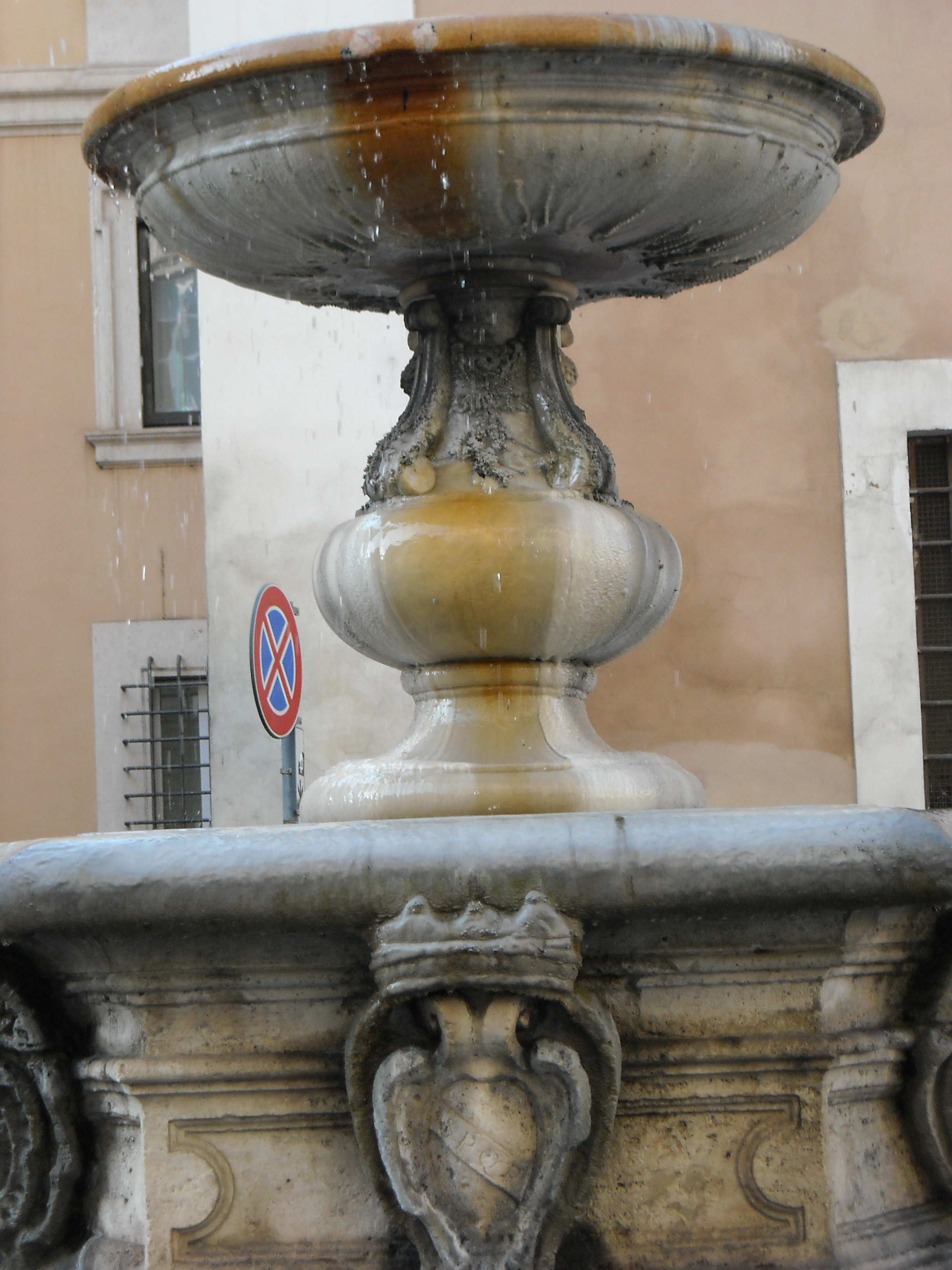 Il balaustro e il catino superiore della fontana di piazza Campitelli